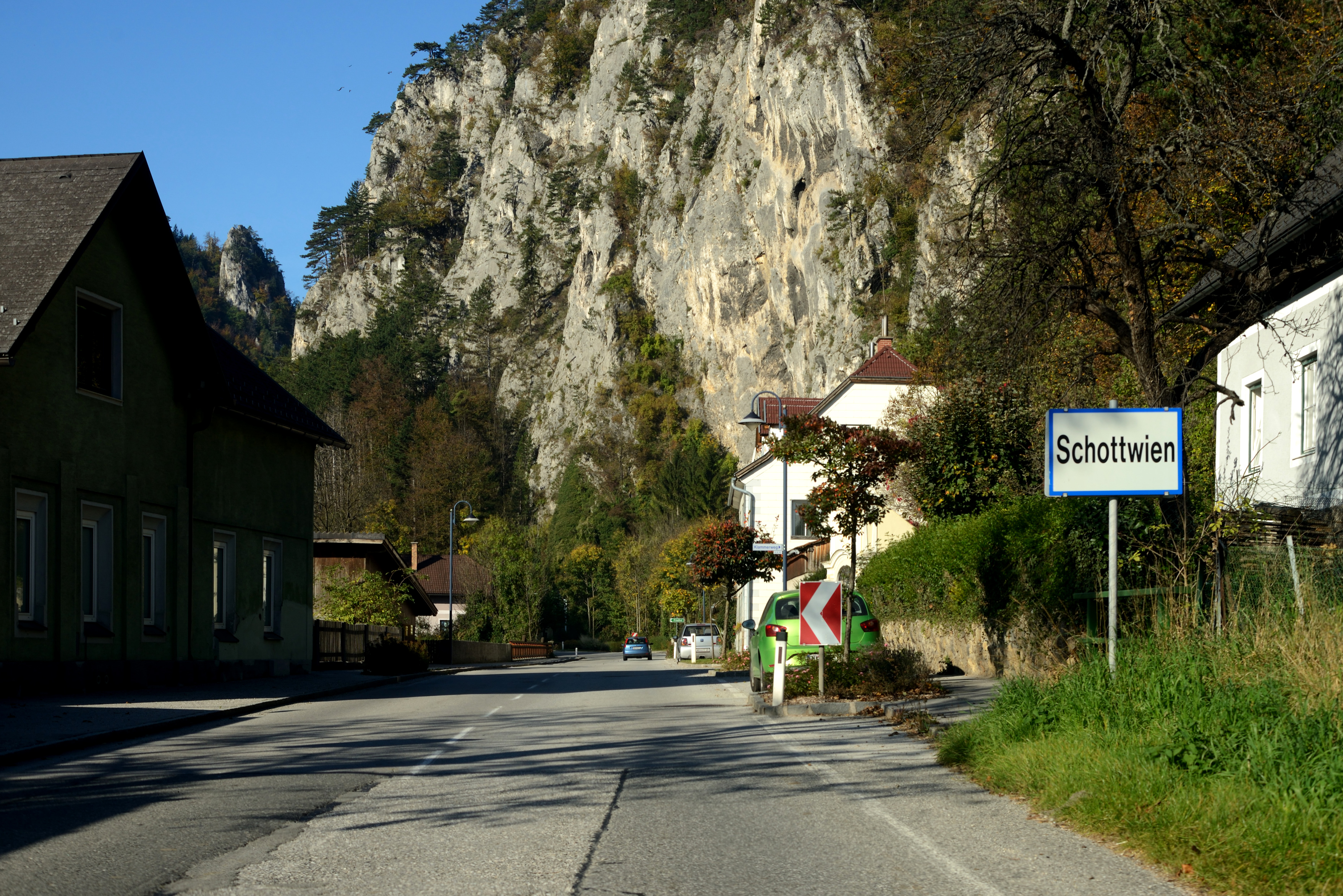 Ortstafel von Schottwien